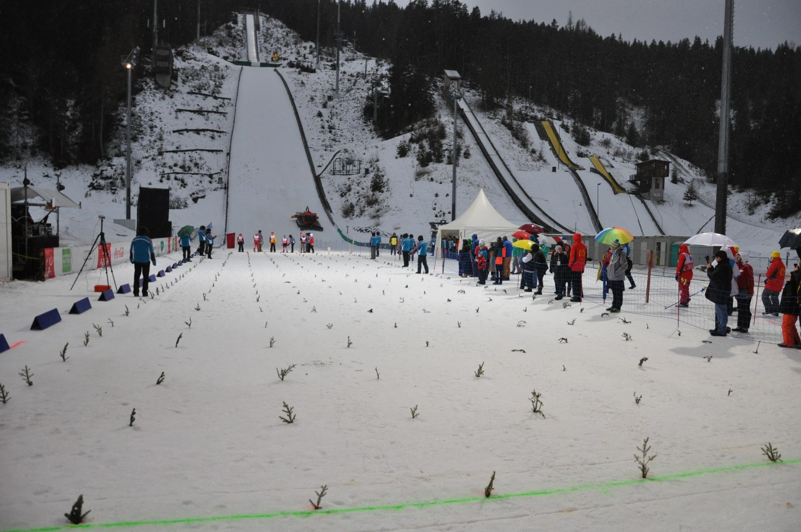 Pre Games 2016 Schladming